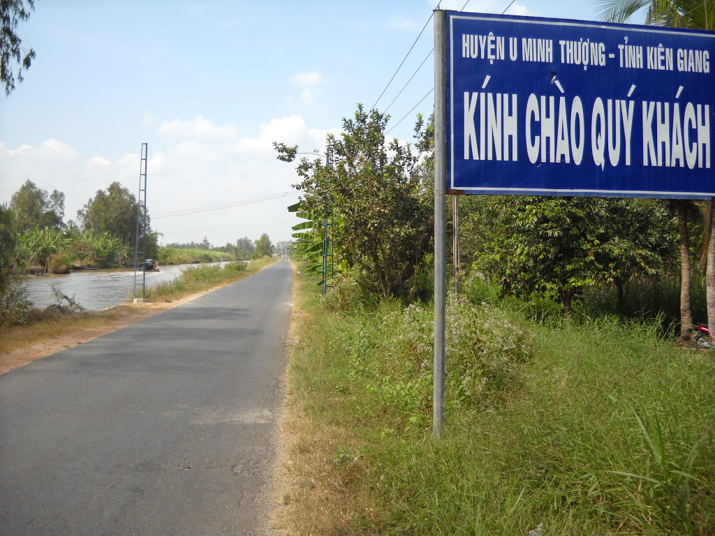 U Minh Thượng